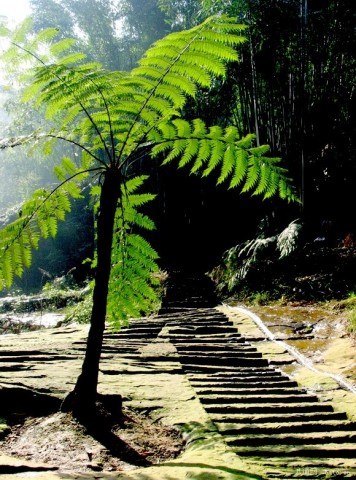 福建省福安市瓜溪桫欏自然保護區